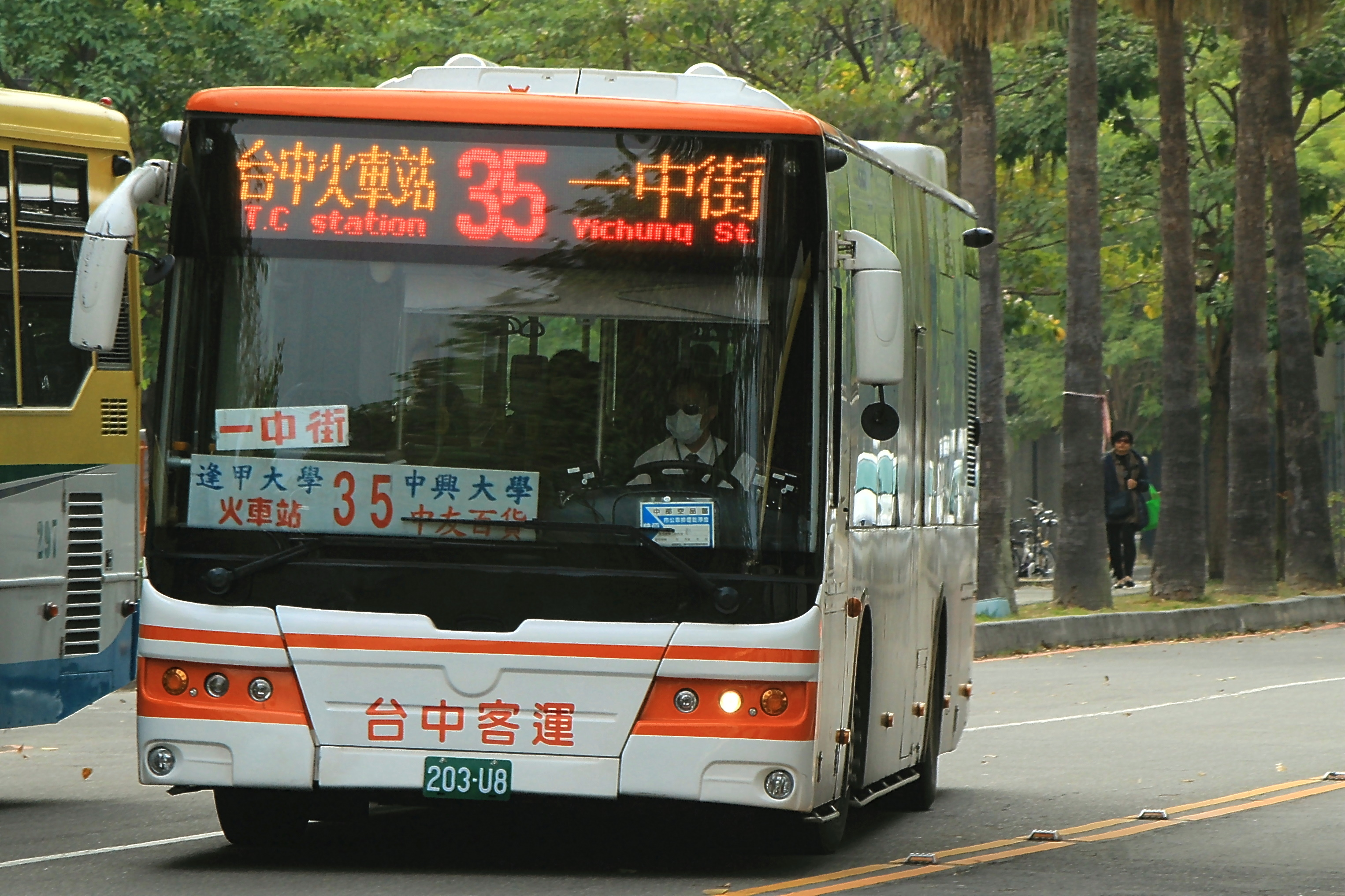 35路 中興大學